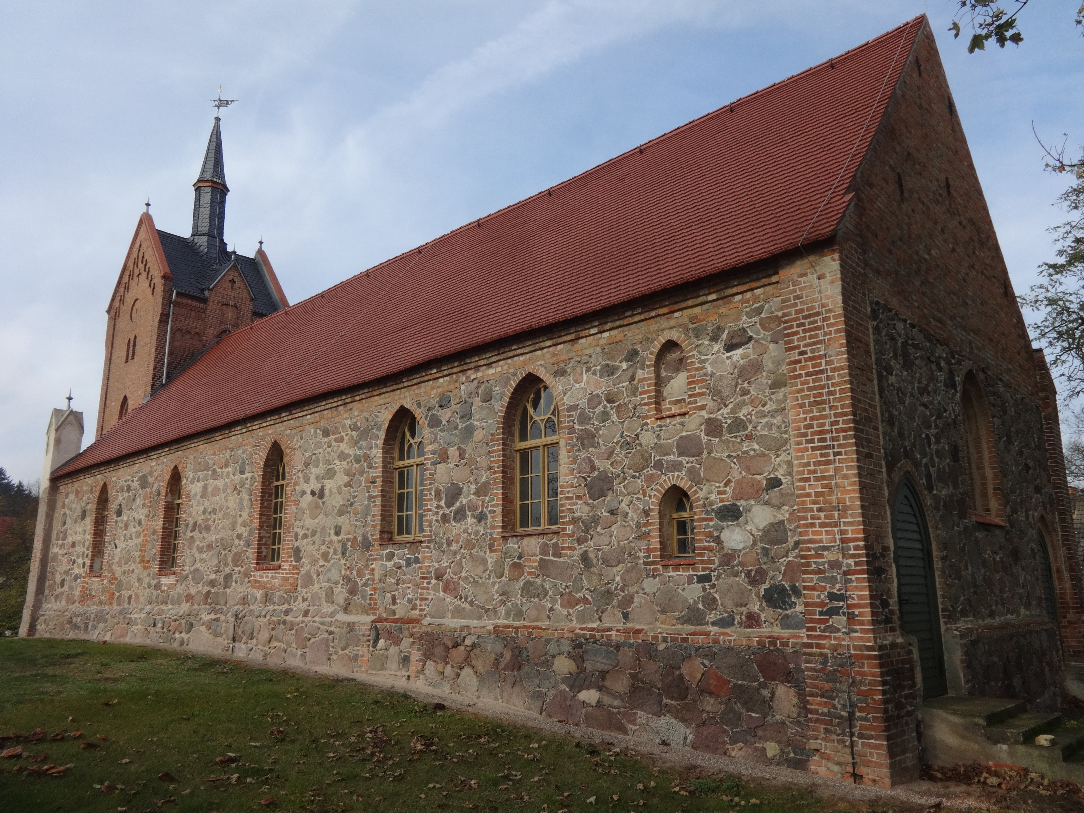 Die Dorfkirche in Wulkow, Gemeinde Neuhardenberg im Landkreis Oder-Spree, ist eine Feldsteinkirche, die 1874 in neugotischen Formen erneuert wurde. Gleichzeitig errichtete die Kirchengemeinde den Westturm.